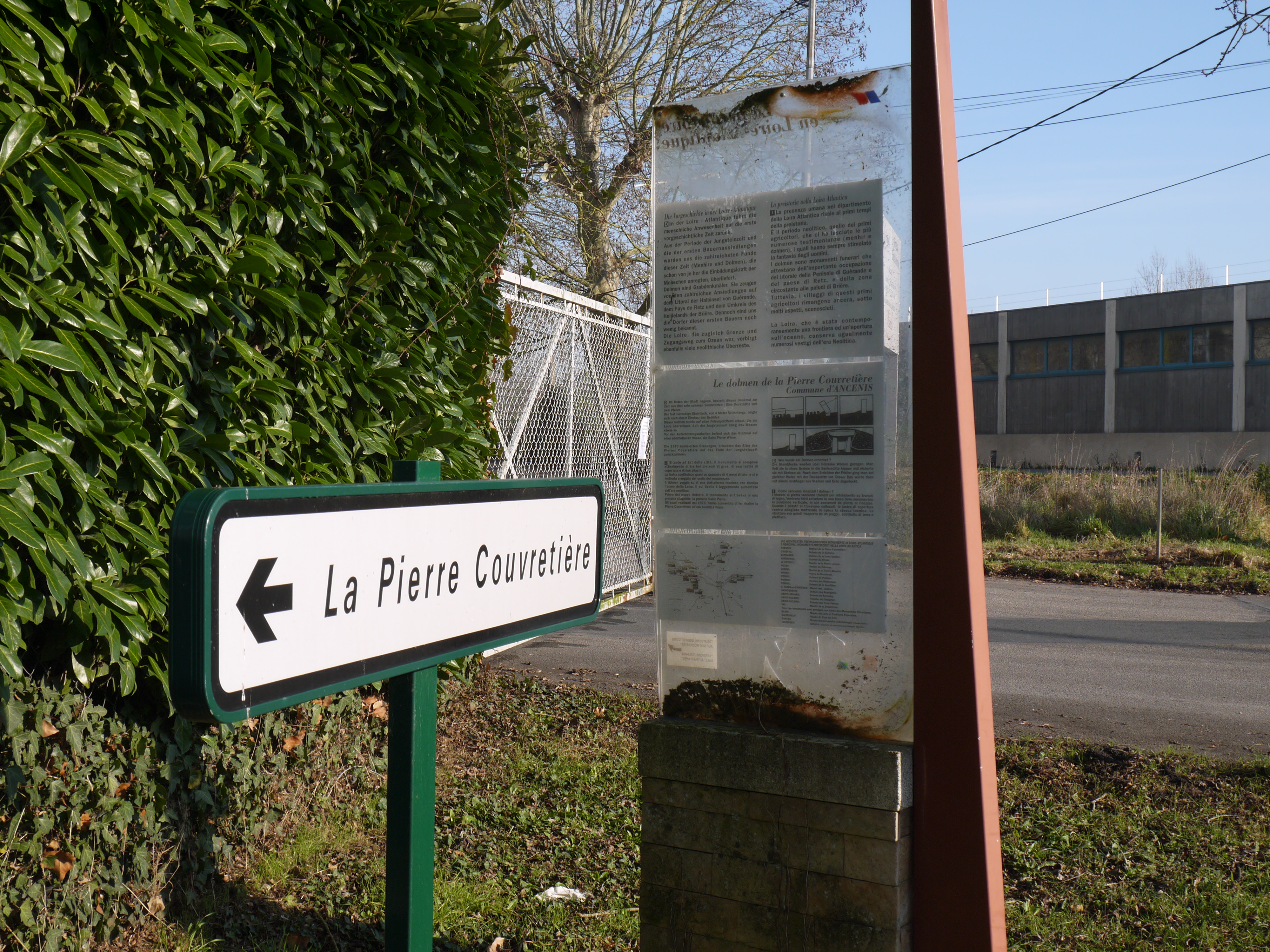 Dolmen de la Pierre Couvretière - entrée